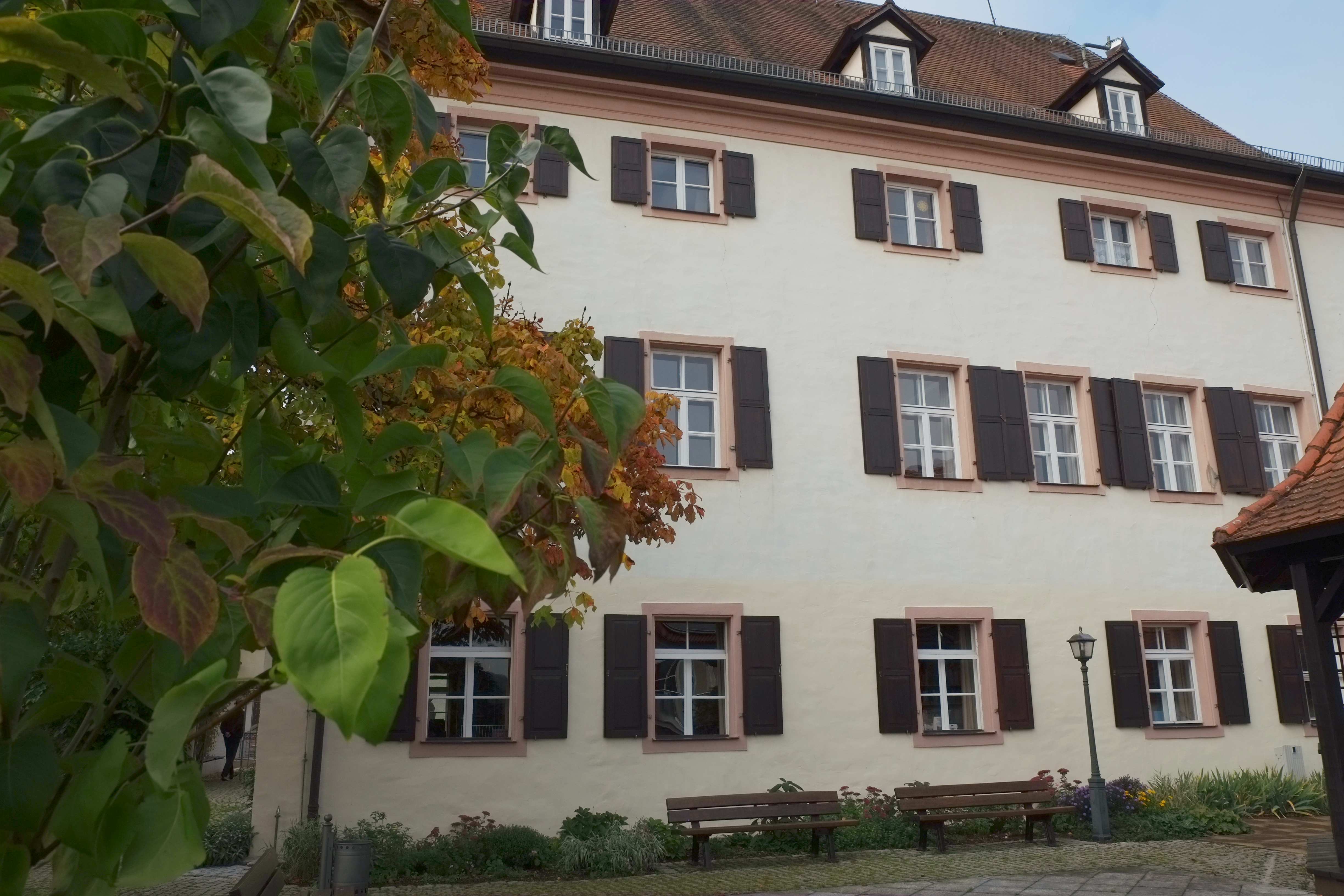 Schloss in Pleinfeld im Landkreis Weißenburg-Gunzenhausen (Bayern/Deutschland)